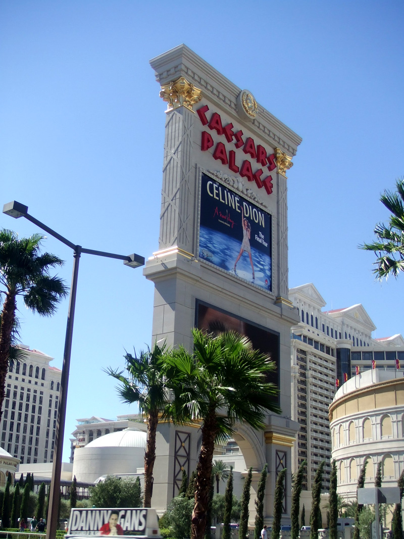 Retrato publicitario de Celine Dion en el hotel/casino Caesars Palace